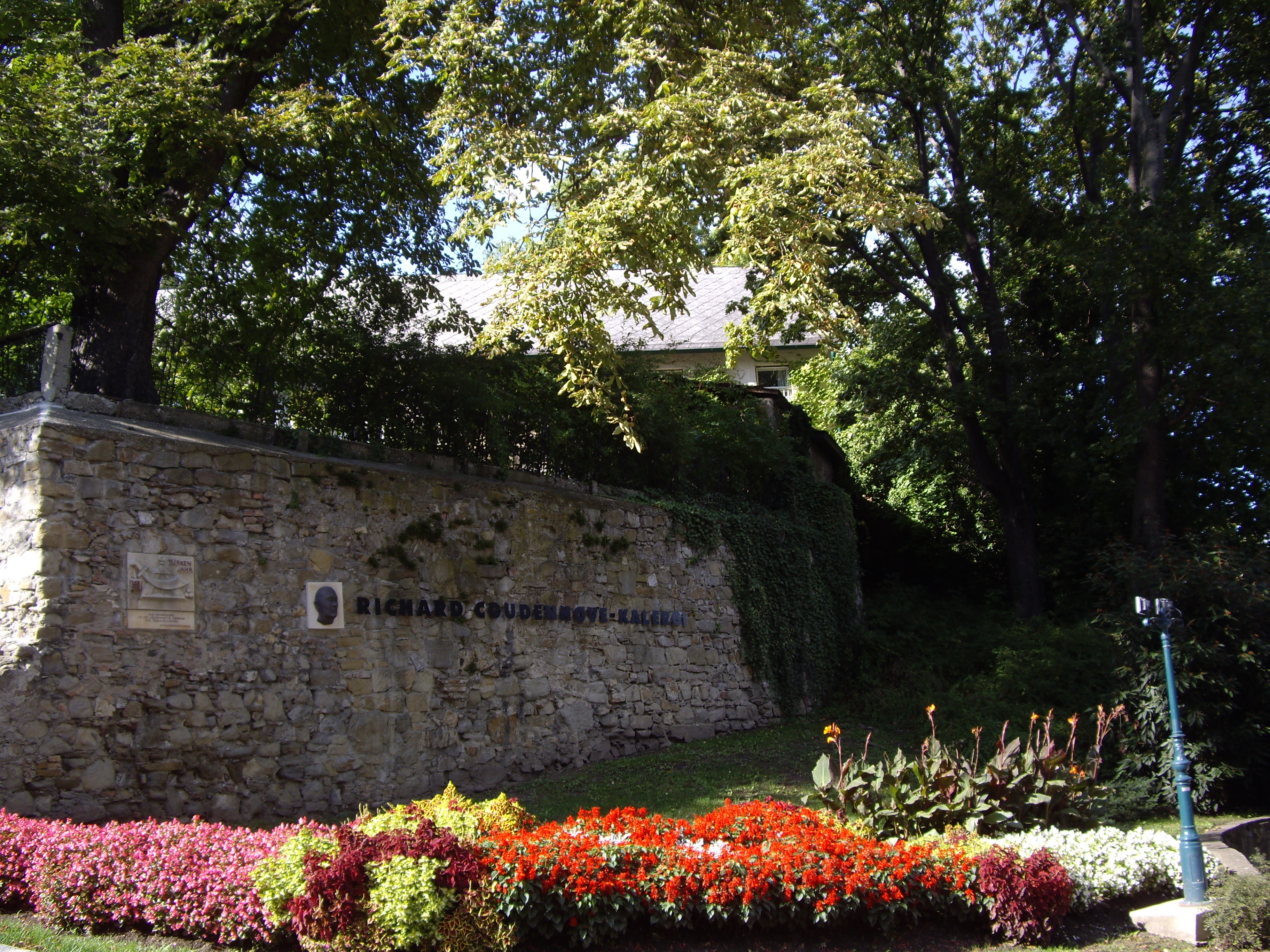 Floroj en la Eŭropo-placo de Klostronovburgo, Urbo de la Interpopola Kompreniĝo